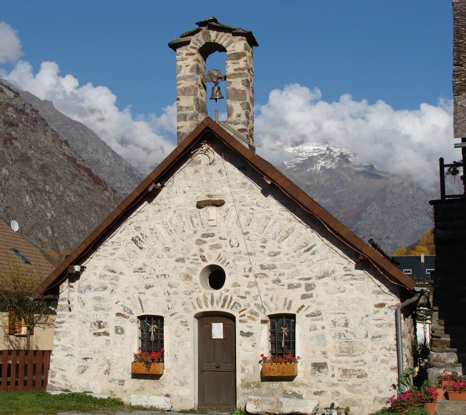 Chapelle de la Chaup, commune de Saint-Jacques-en-Valgodemard (Hautes-Alpes).